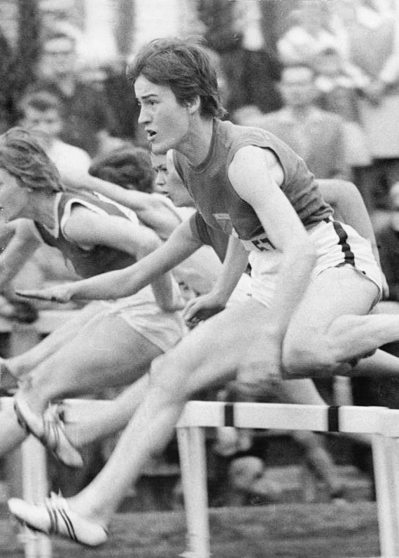 Karin Balzer Zentralbild 2.10.1963 Leichtathletik Olympianormen erfüllt Bei einem Sportfest im Hallenser Kurt-Wabbel-Stadion erfüllten die Leichtathleten der DDR am 1.10.1963 troz kühler Witterung und regennasser Bahn nicht weniger als 13 mal die Normen für die Olympischen Spiele 1964 in Tokio. UBz: Erfolgreichste Teilnehmerin war Karin Balzer (SC Frankfurt) mit 11,0 sek über 80-m-Hürden und 55,1 sek über 400 m. Auch zu den deutschen Meisterschaften in Jena (unser Bild) wurde sie Meisterin über 80-m-Hürden und im Weitsprung.